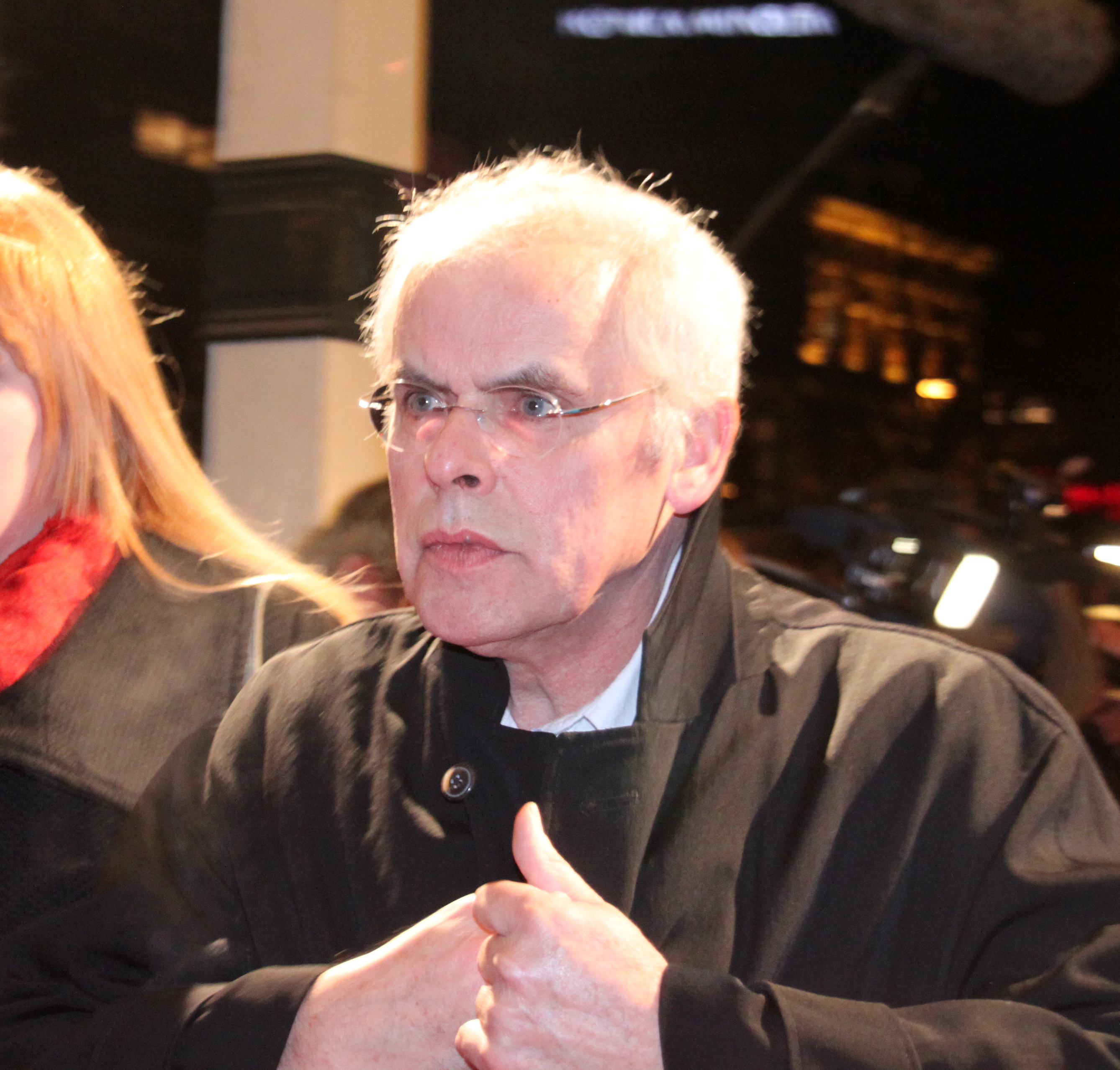 Bert Keizer